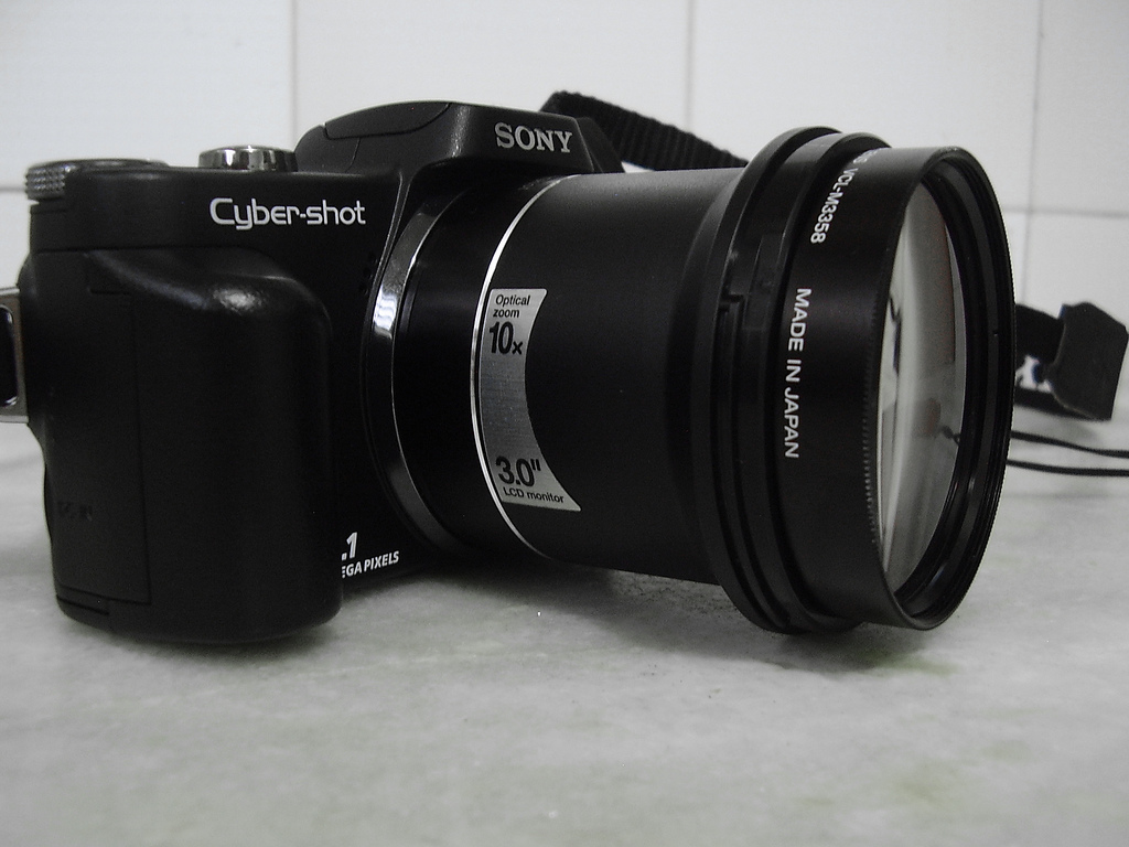 H10 com lente Sony VCL-M3358 Close-Up